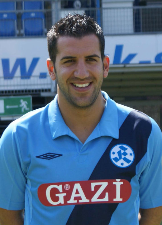 Vincenzo Marchese 2010 im Trikot der Stuttgarter Kickers